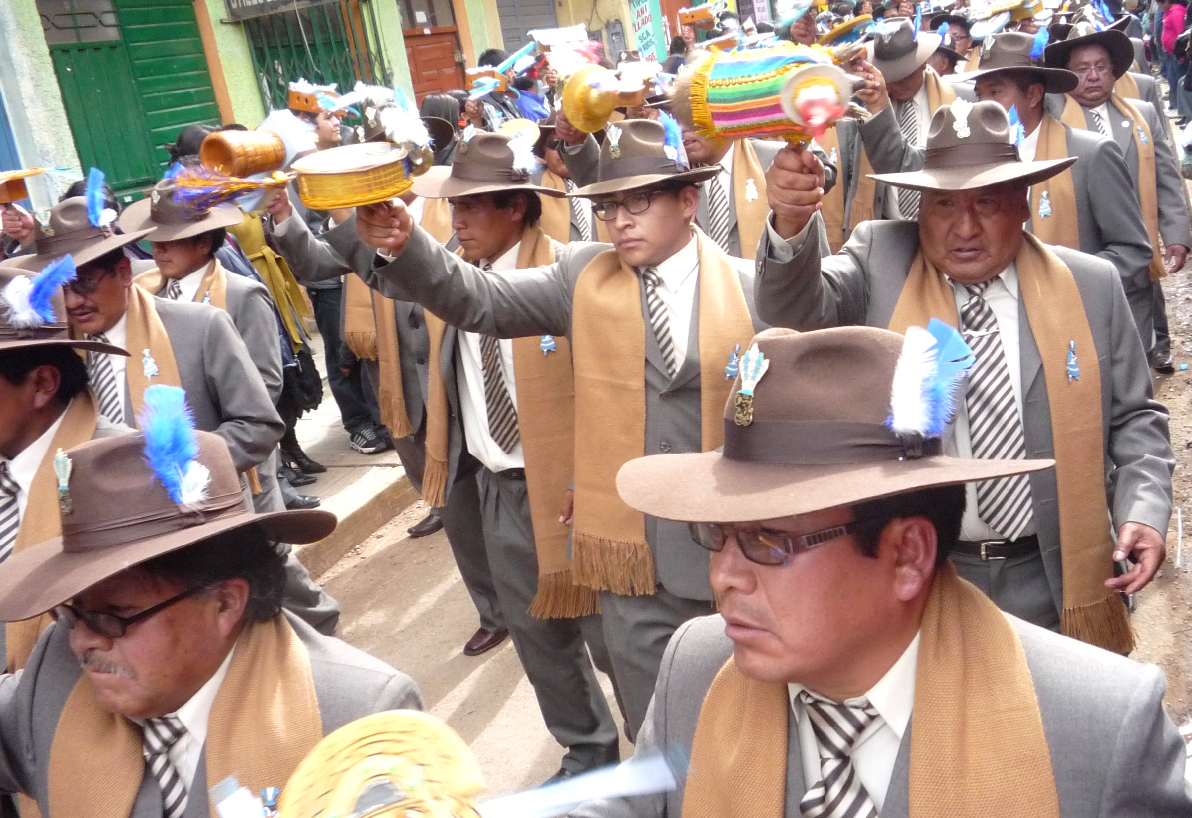 Morenada Orkapata 2014